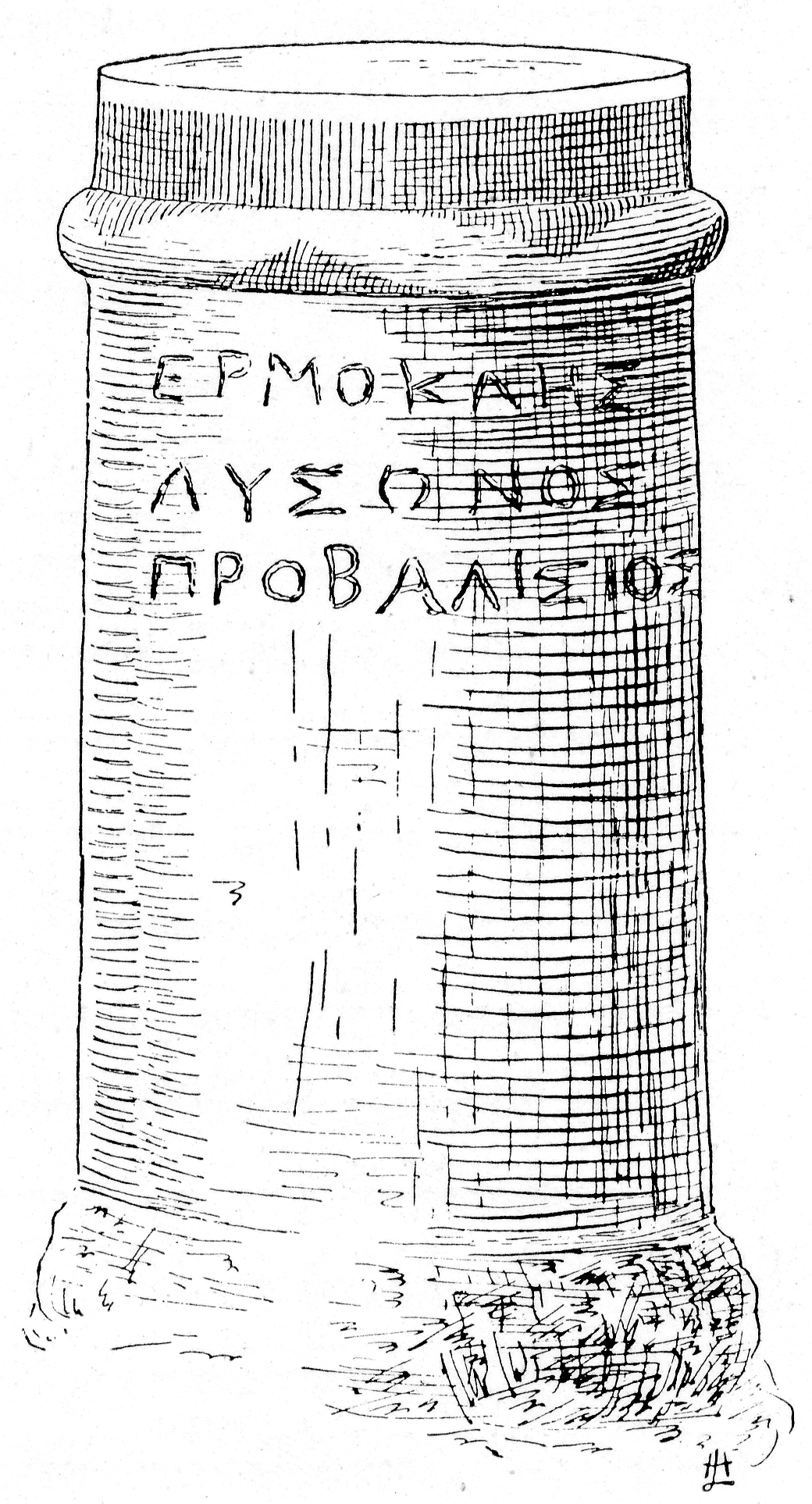 Kerameikos in Athen: Säulchen des Hermokles (Abbildung aus Alfred Brueckners "Der Friedhof am Eridanos", Berlin 1909)